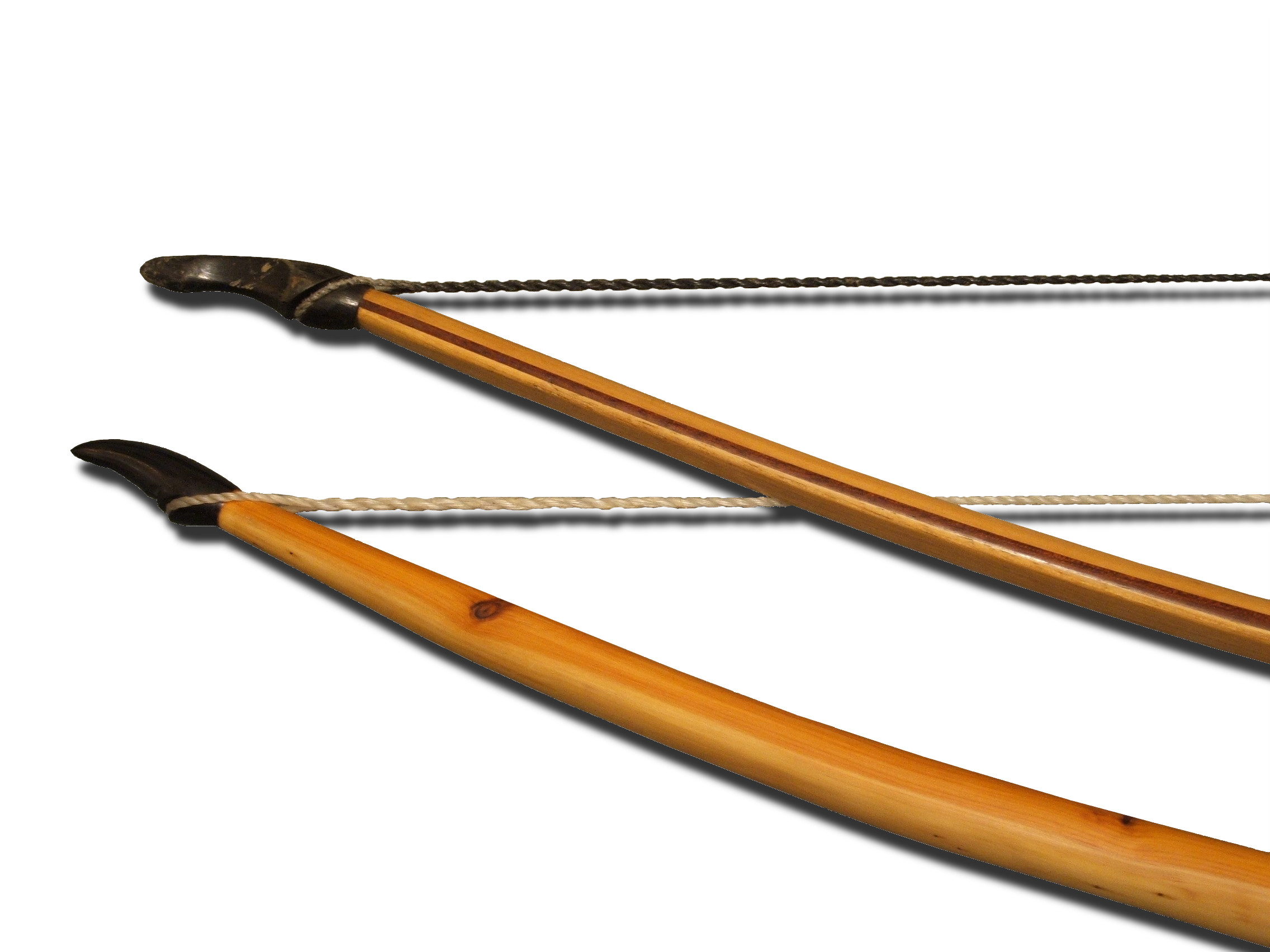 extremités de longbow